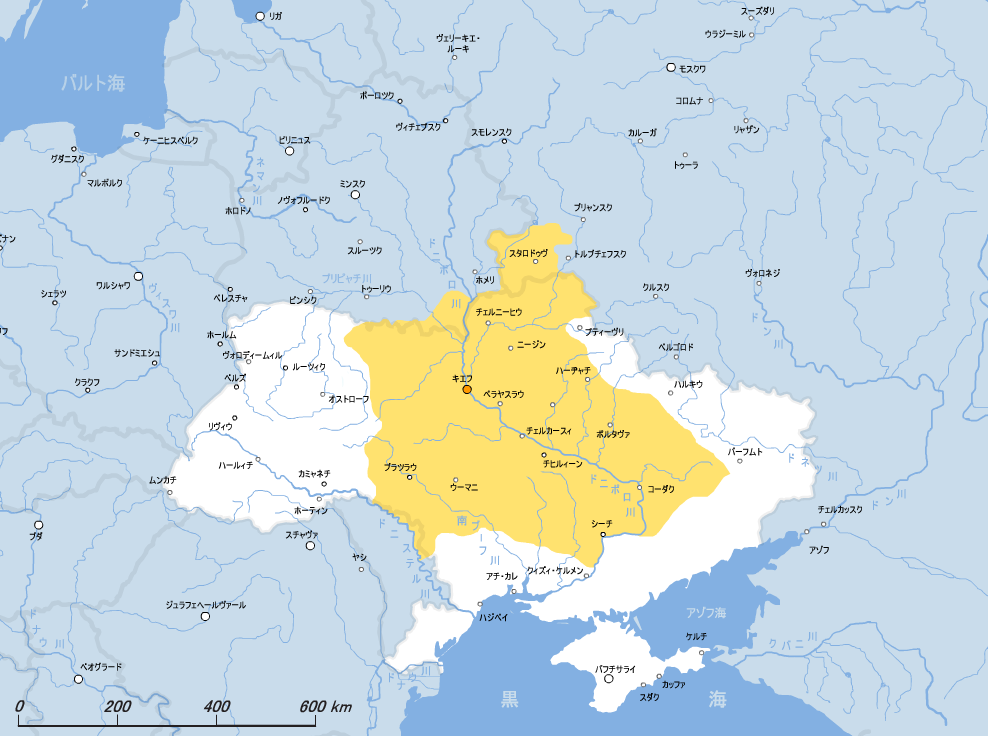 Мала Русь (Малоросія) у